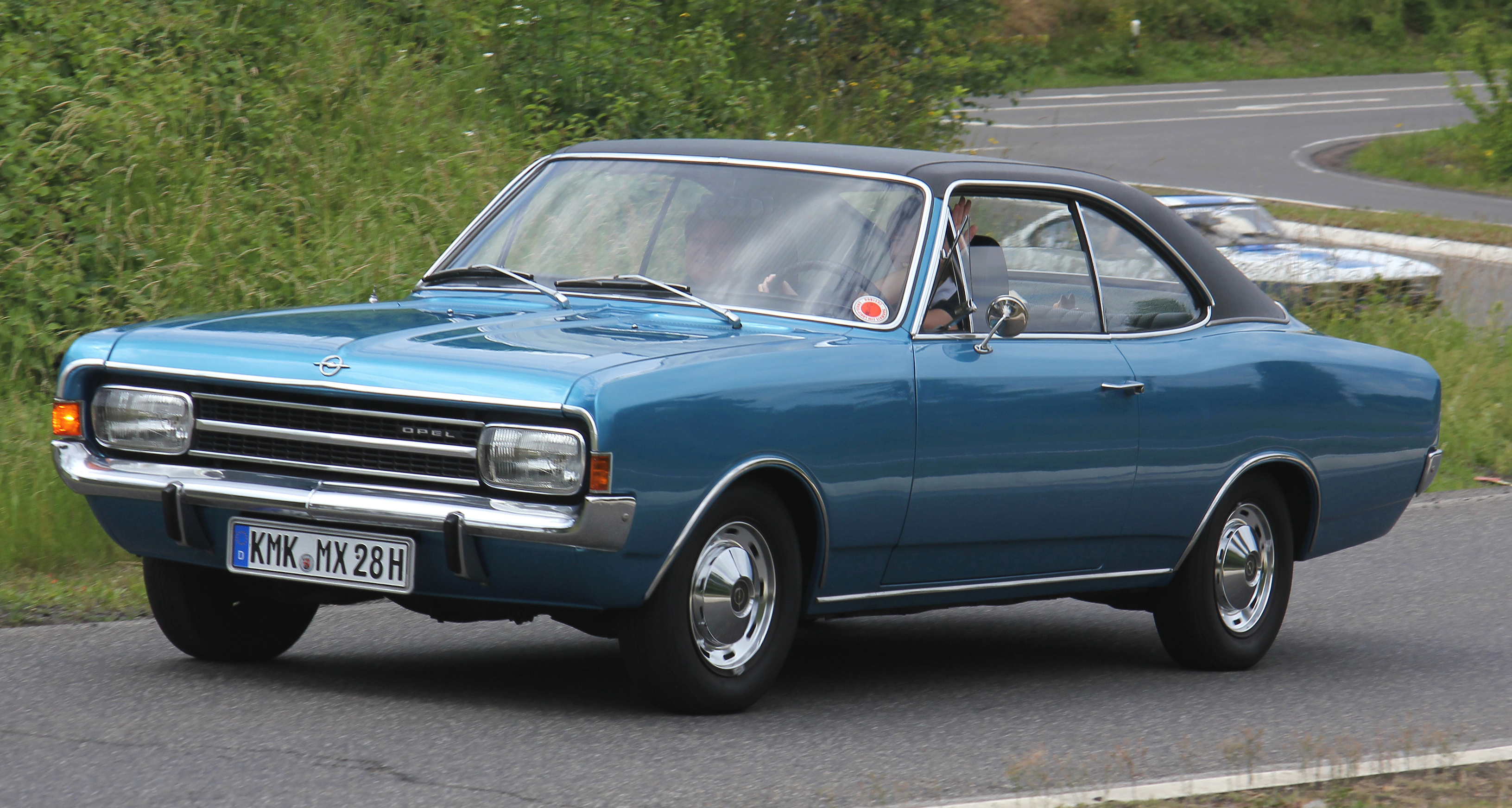 Opel Rekord C, Coupé 1900 S, Baujahr 1971 (Phantasiekennzeichen)